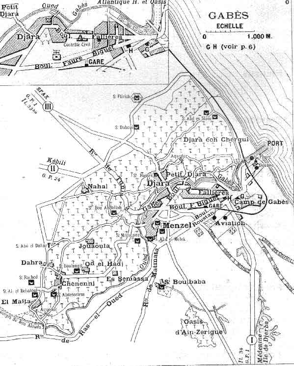 Plan de Gabès en 1928, Tunisie